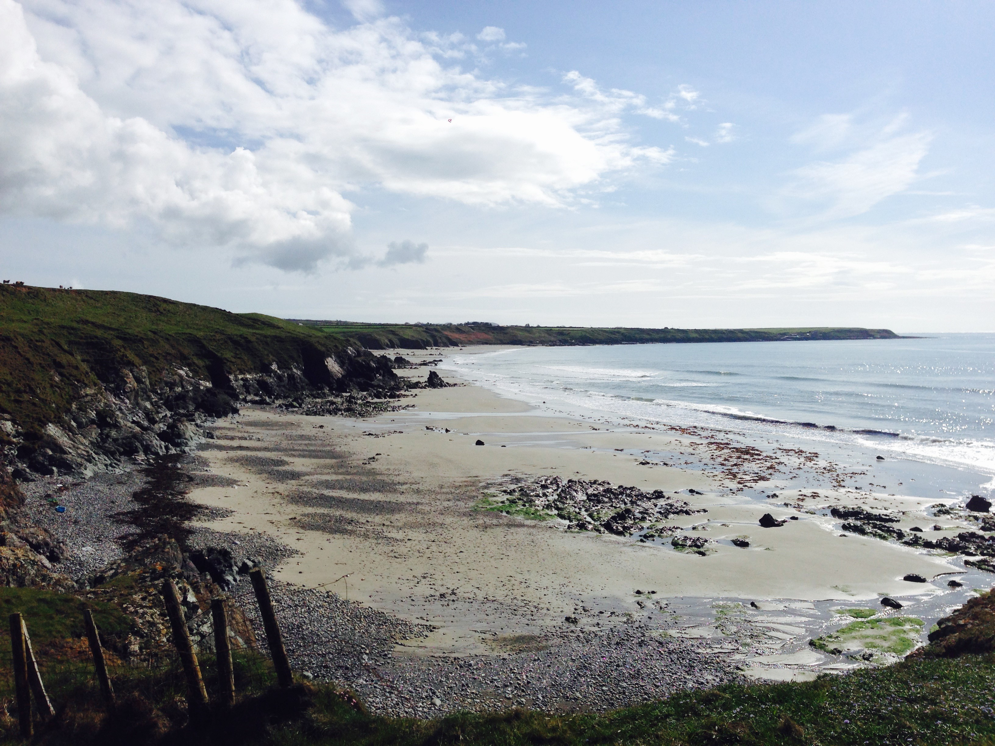 Traeth Penllech o Benrhyn Melyn